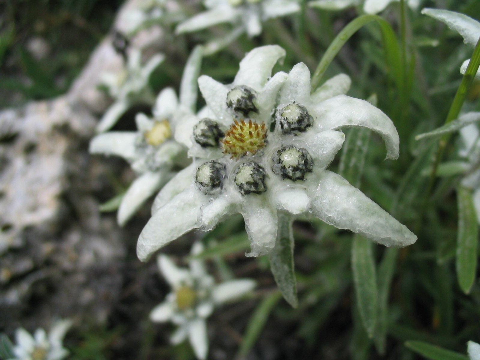 Замёрзший цветок